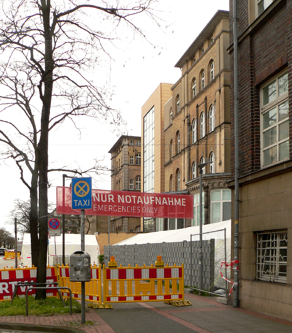 Erweiterte Notaufnahme wegen Covid 19